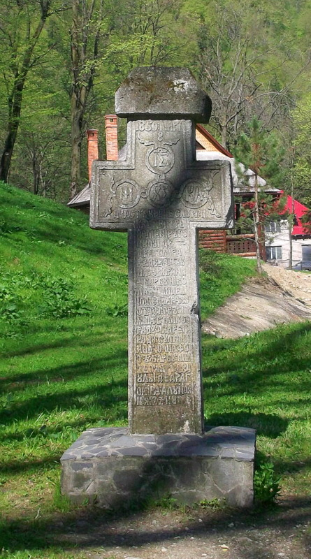 Bran, krzyż w ogrodach zamkowych